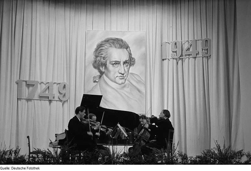 Original image description from the Deutsche FotothekKirmse-Quartett auf der Bühne der Goethetage-Veranstaltung